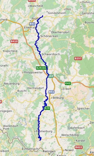 carte réalisée sur umap This map may be incomplete, and may contain errors. Don't rely solely on it for navigation.